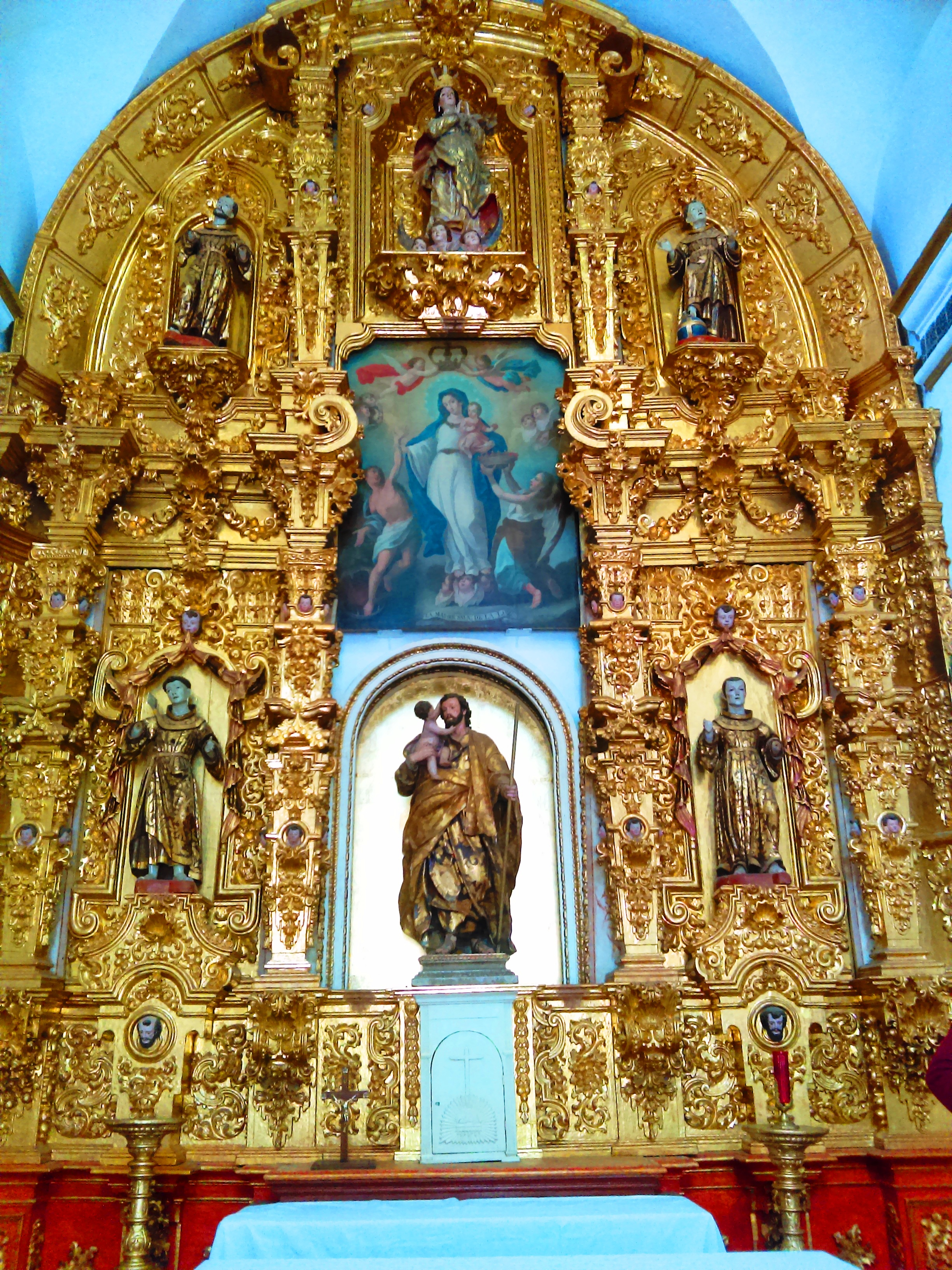 Capilla de Nuestra Señora de la Luz en Pachuca, México